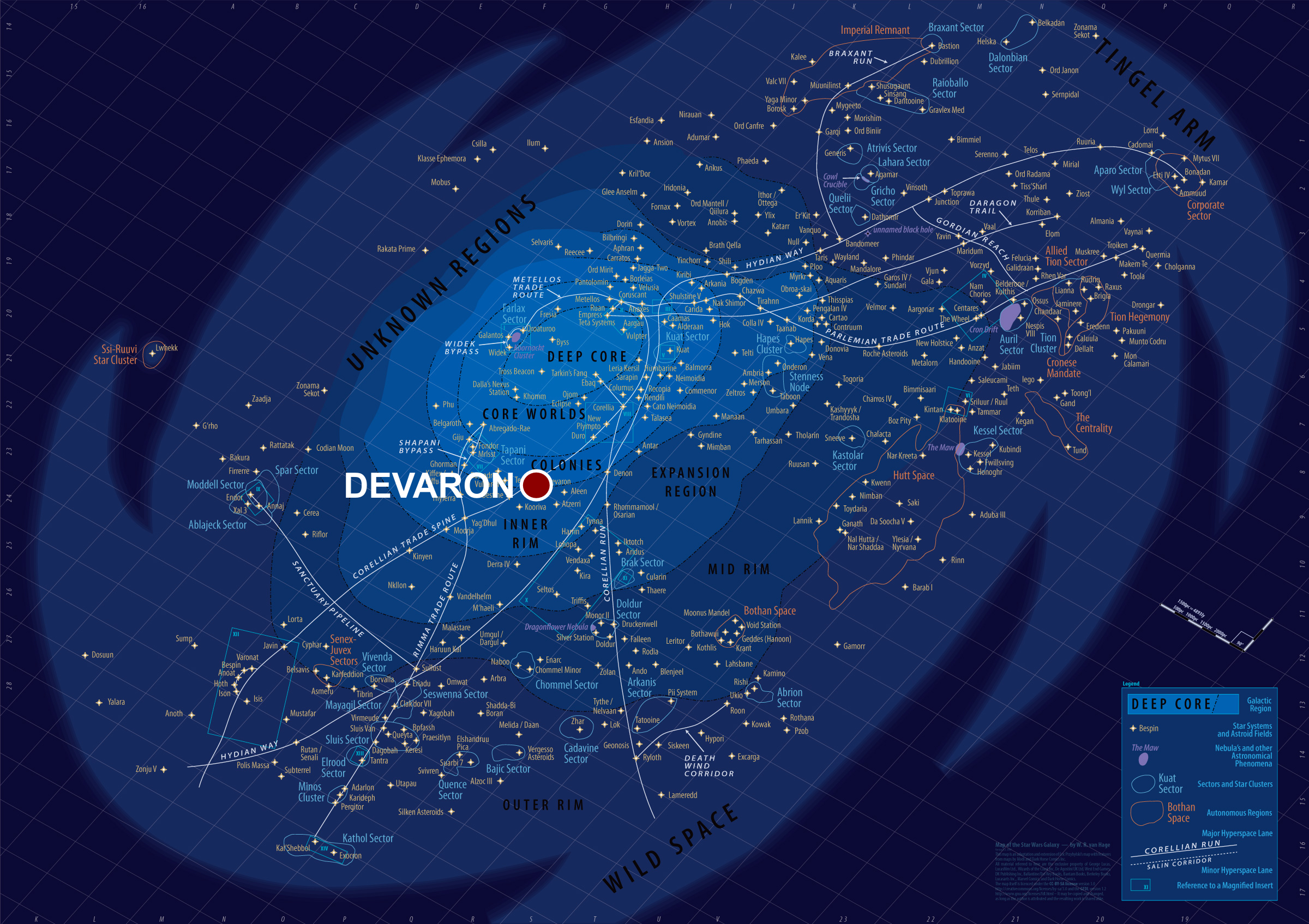 Localisation de Devaron sur la carte Star Wars